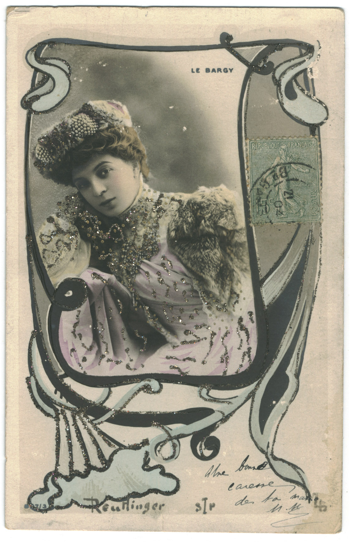 Simone Le Bargy, SIP 873.